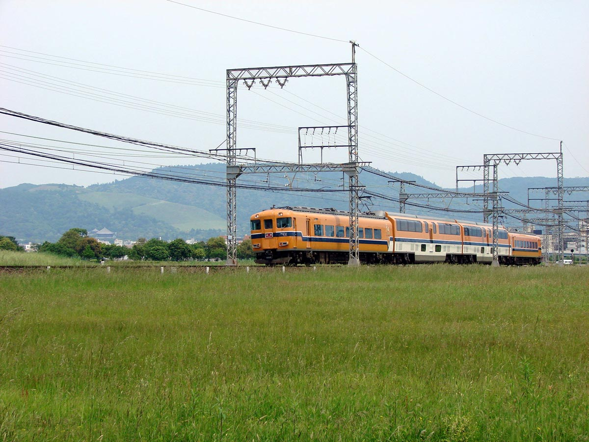 若草山をバックに平城京跡を走る近鉄30000系（大和西大寺－新大宮間）